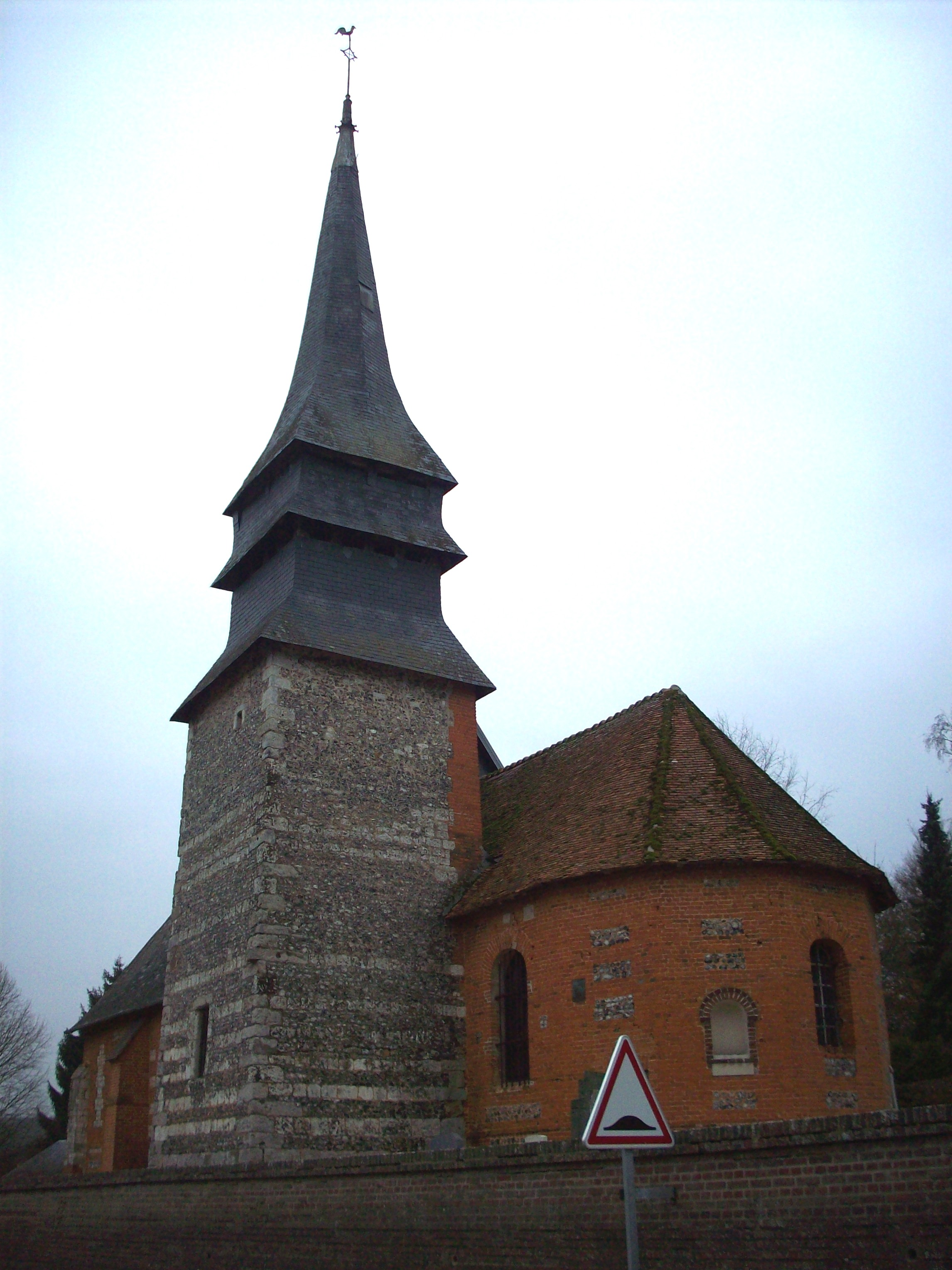 Eglise de Morville-sur-Andelle.